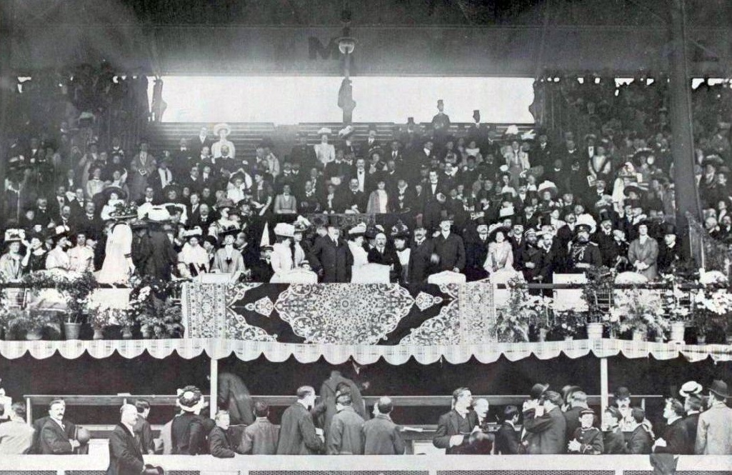 Edouard VII inaugure le stade des JO de 1908.